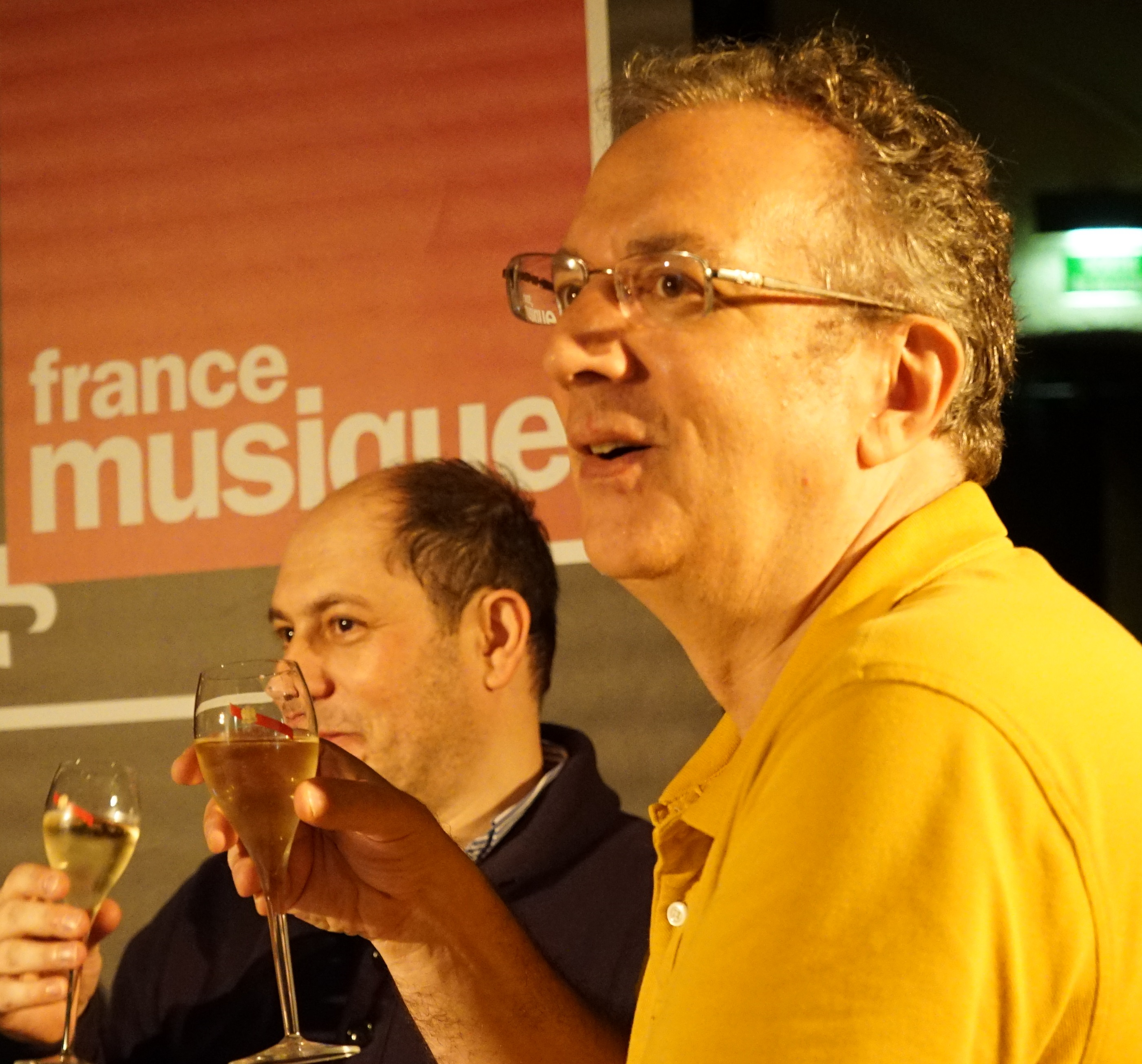 lors de Open Jazz en direct de l'ouverture de Jazz à reims.